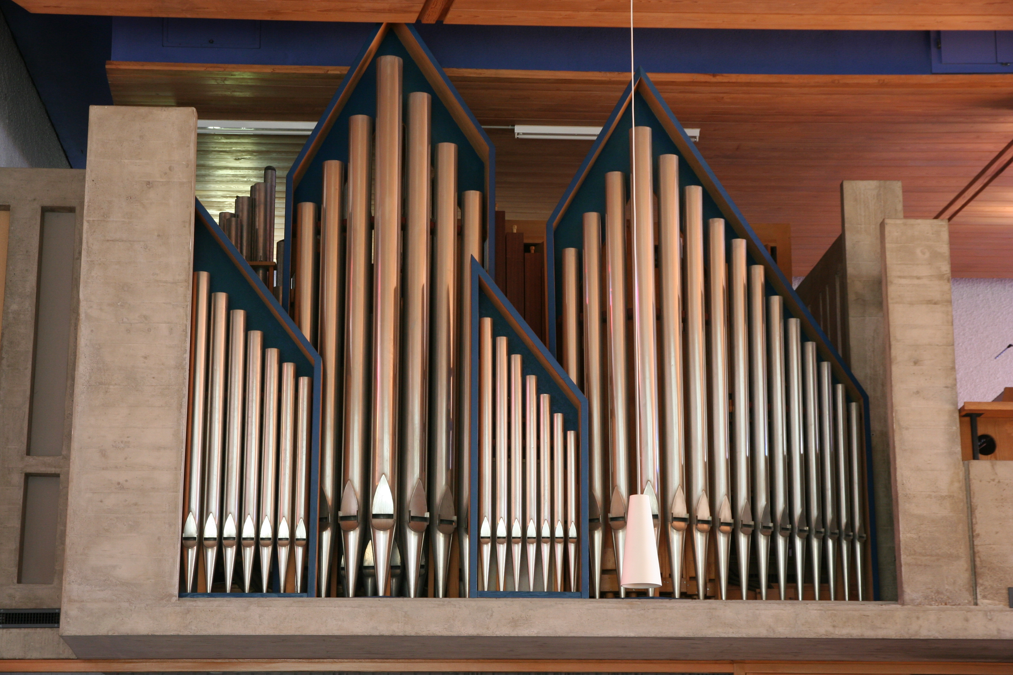 röm.-kath. Pfarrkirche Maria Königin Sitterdorf TG